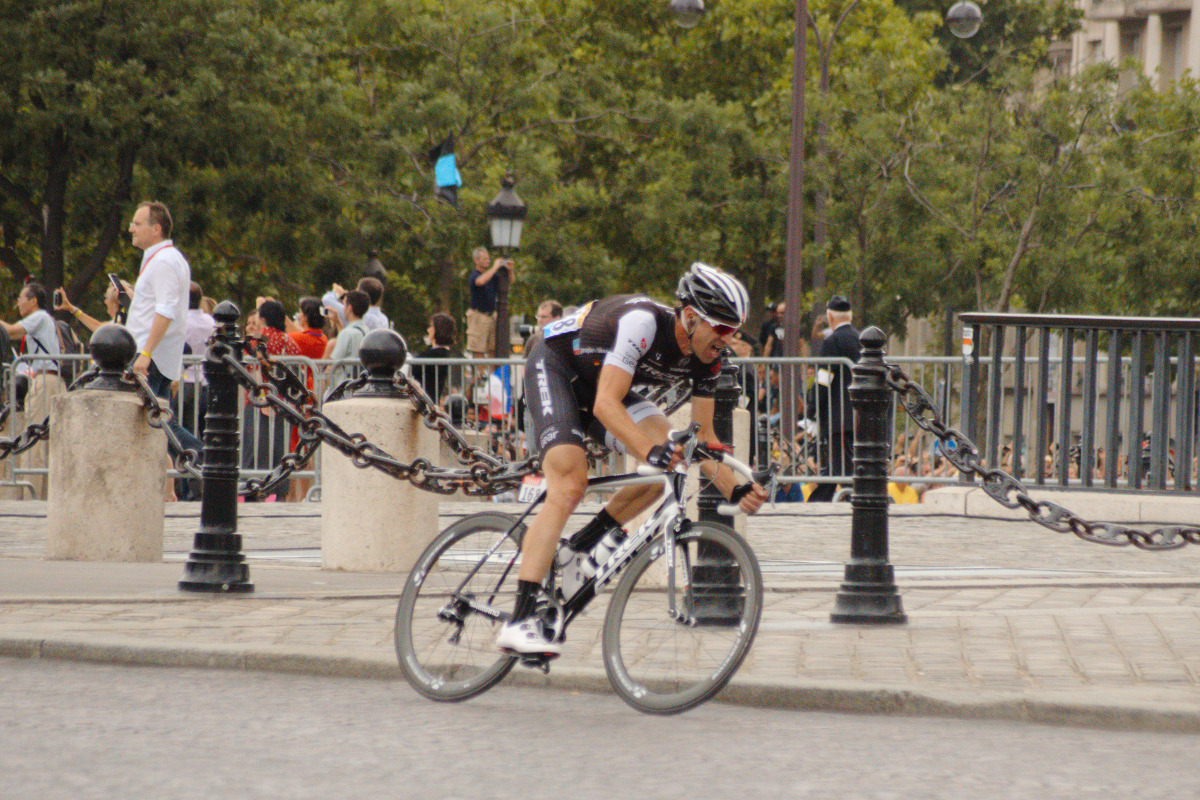 21è étape du Tour de France 2014, Evry-Paris Champs Elysées, photo prise à Paris au pied de l'Arc de Triomphe.